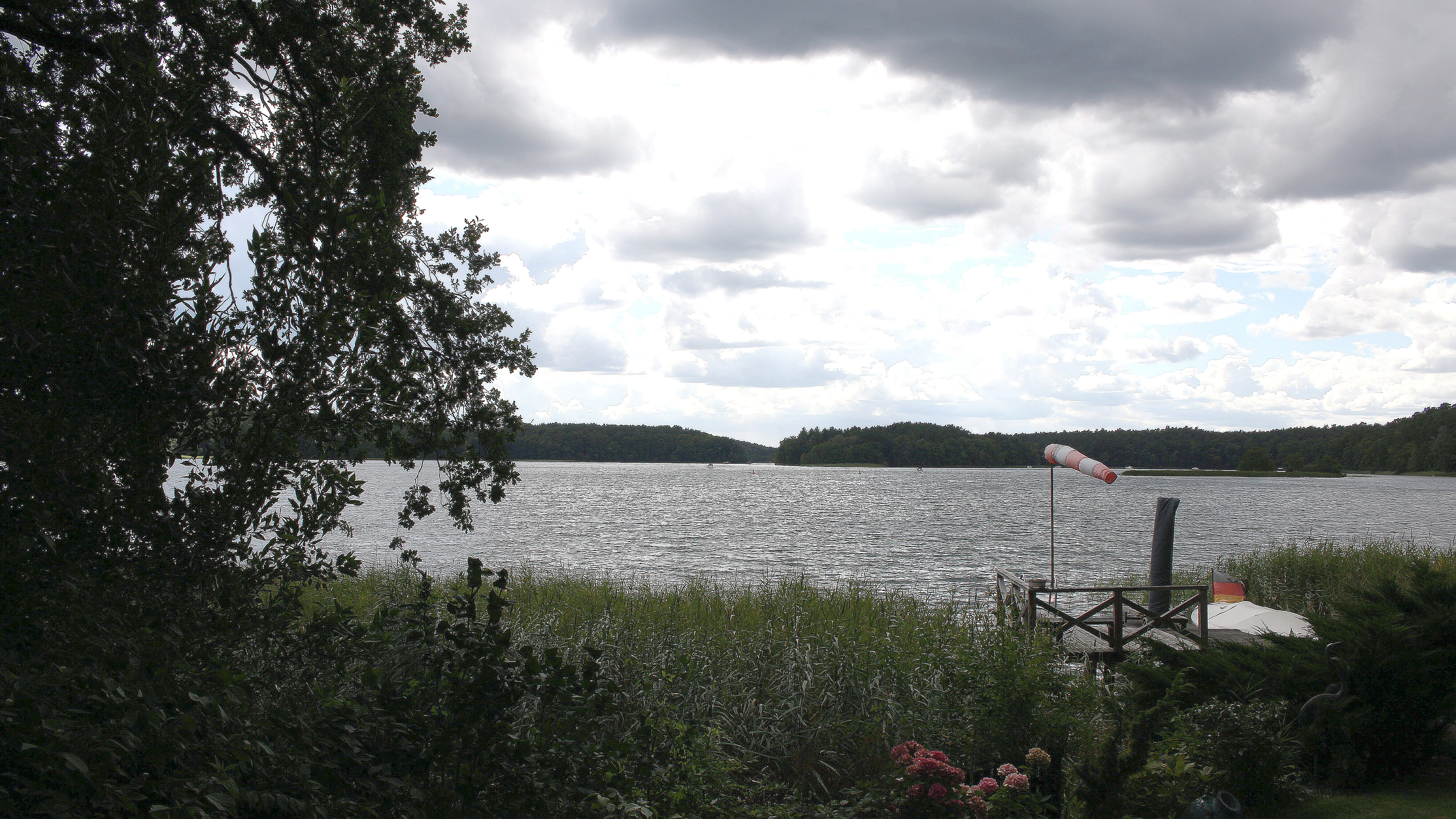 Zootzensee